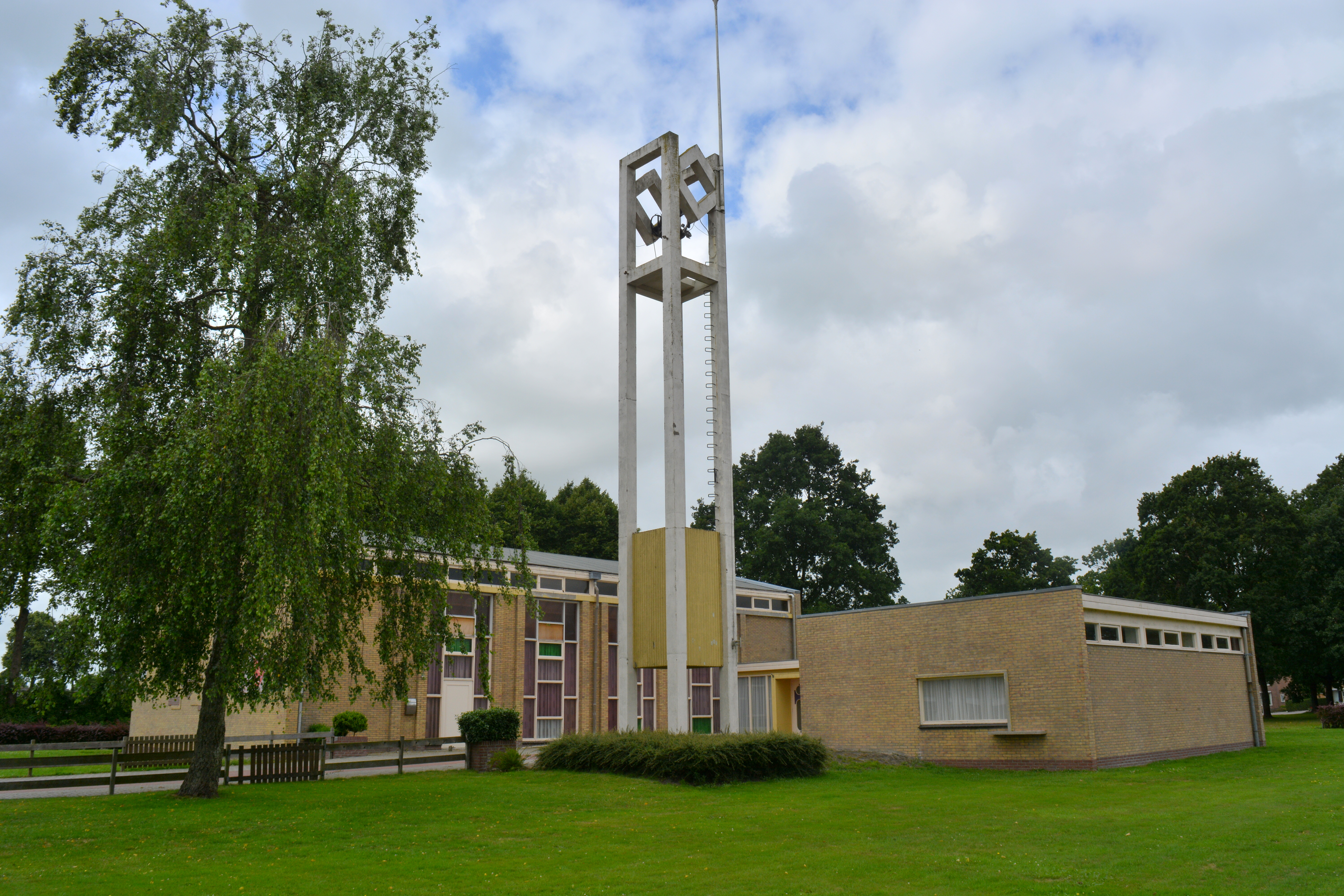 Zwaagwesteinde, Torenkerk